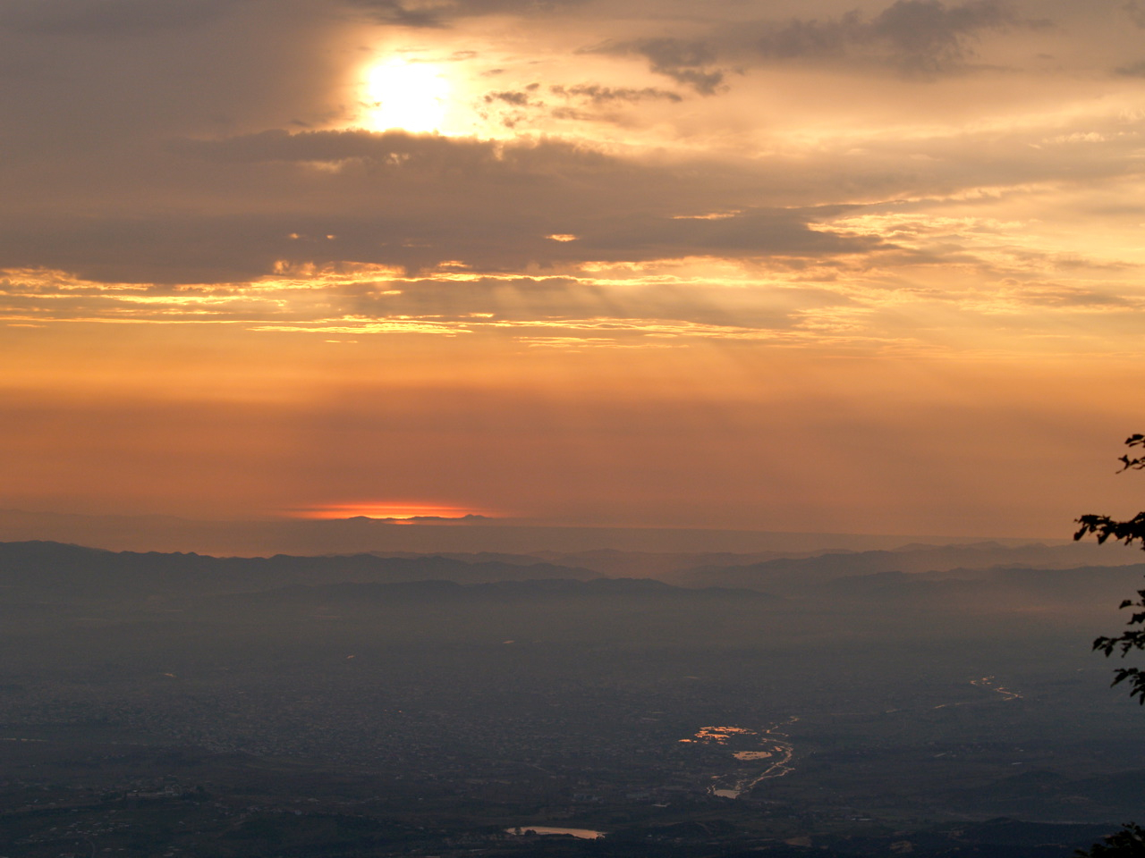 Sunset over Tirana (Albania) seen from Mount Dajti